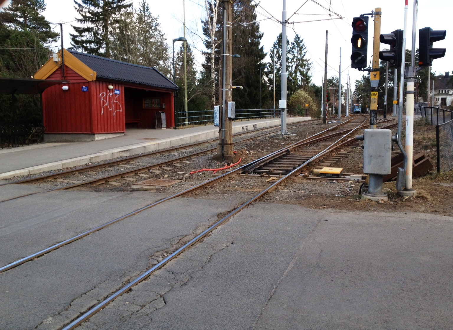 Bråten stasjon på Ekebergbanen, Oslo